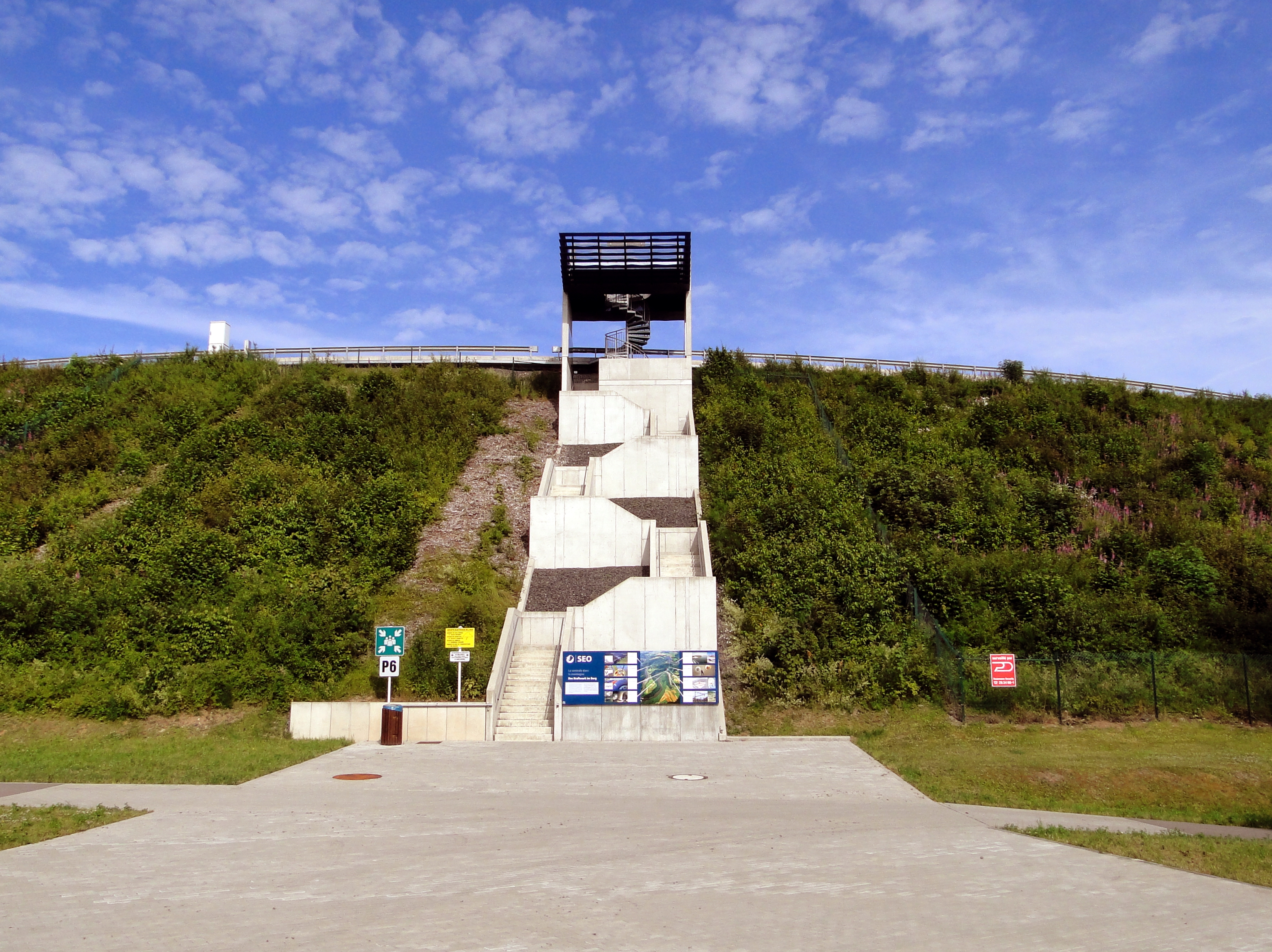 Niklosbierg: Trape fir op den Aussiichtstuerm iwwer den ieweschte Baseng